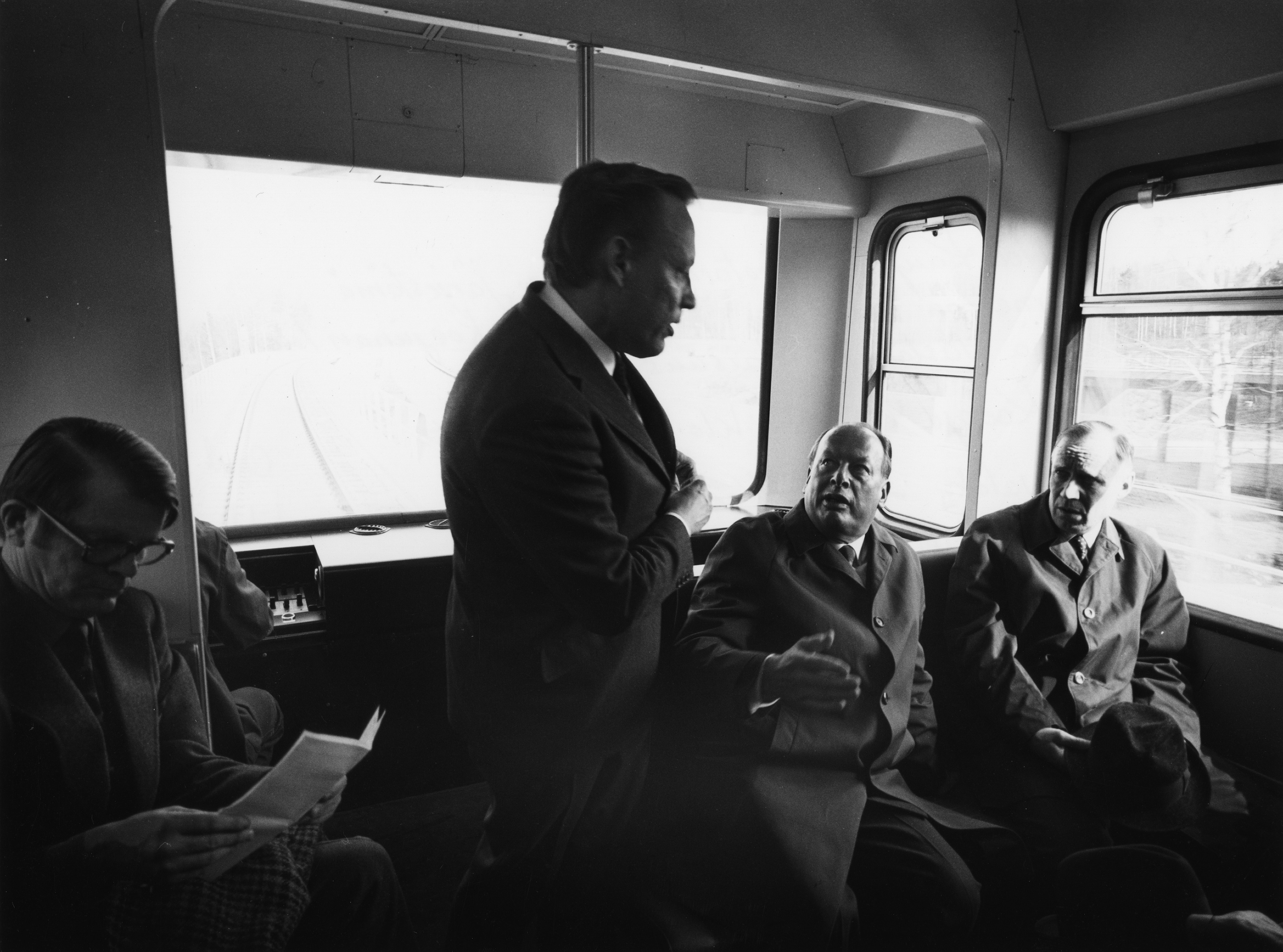 Helsingin kaupungin metrotoimikunnan järjestämä metron koeradan vihkimis- ja koejunan luovutus- ja vastaanottotilaisuus 4.5.1972. Koeajo klo 14.30-15.00. Esittely toimitusjohtaja Unto Valtanen. Kuvassa myös ylipormestari Teuvo Aura ja apulaiskaupunginjohtaja Veikko O. Järvinen.